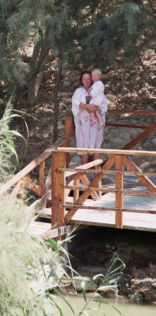 Baptism, Kasser Al Yahud